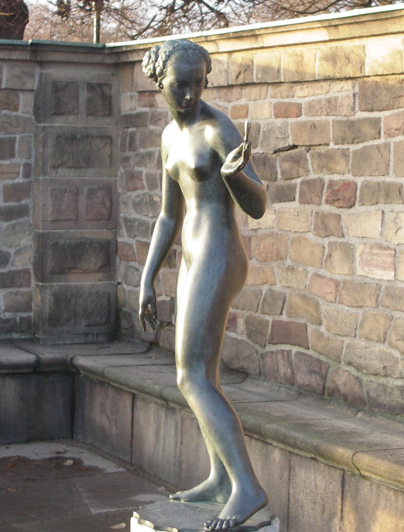 Tore Strindberg: Crocus, Stadshuset, Stockholm